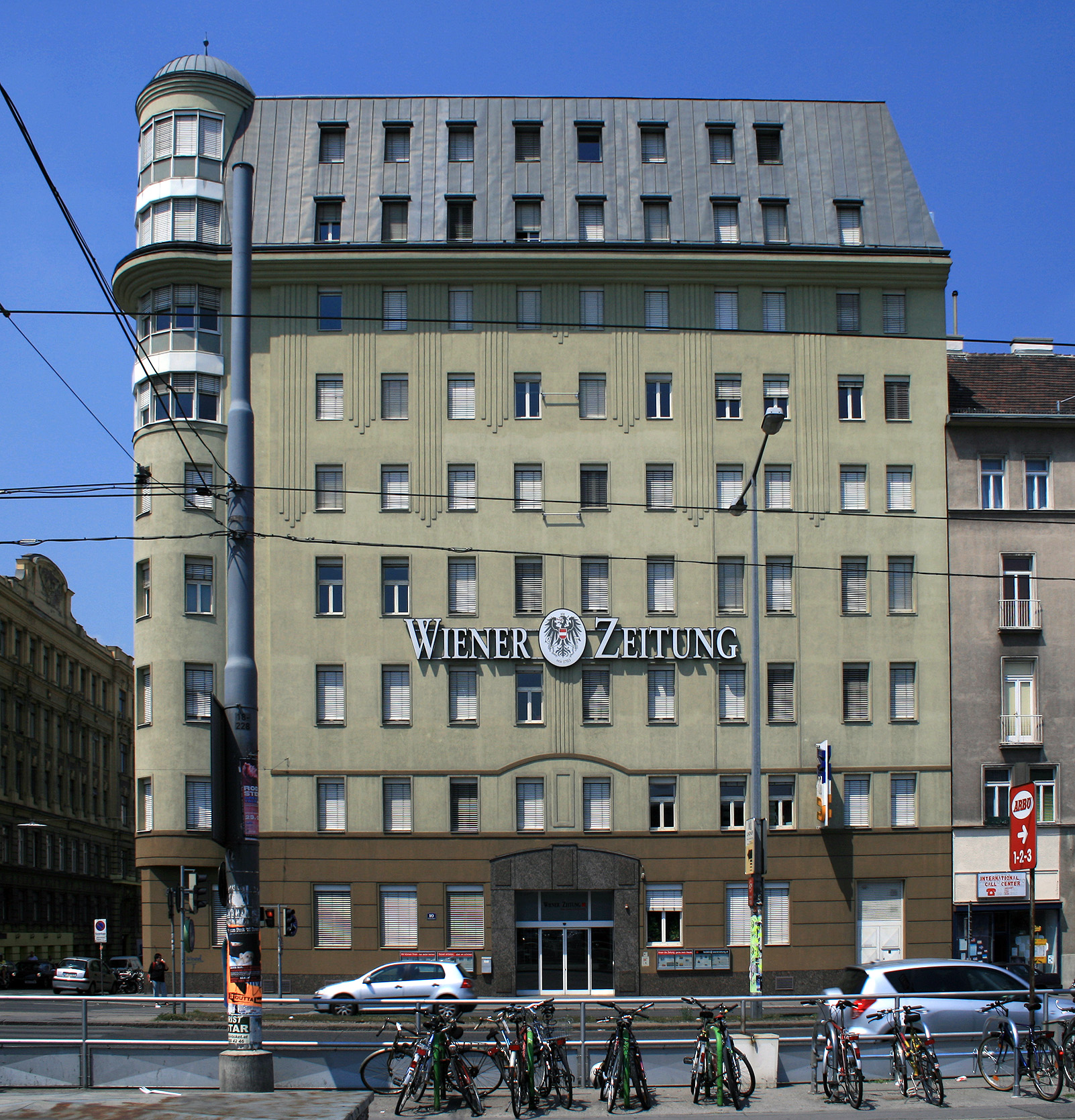 Redaktionsgebäude der Wiener Zeitung bis August 2012, Wiedner Gürtel 10